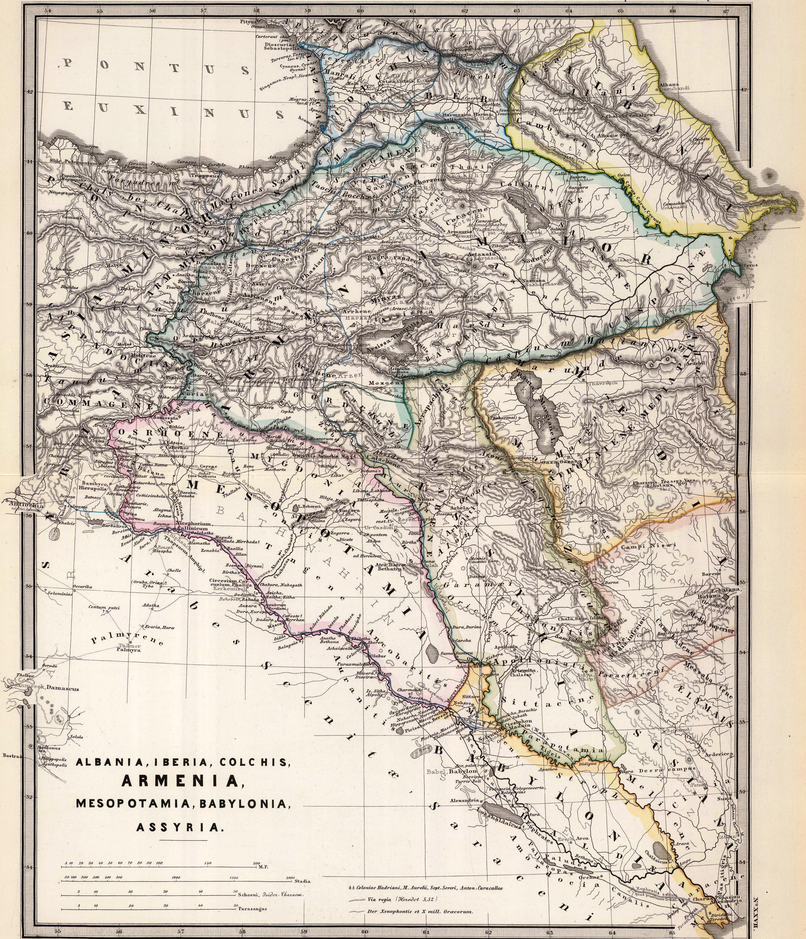 Albania, Iberia, Colchis, Armenia, Mesopotamia, Babylonia, Assyria. Corr. Menke 1863. W. Alt sc. Gothae: Justhus Perthes. Spruner-Menke atlas antiquus. (1865)